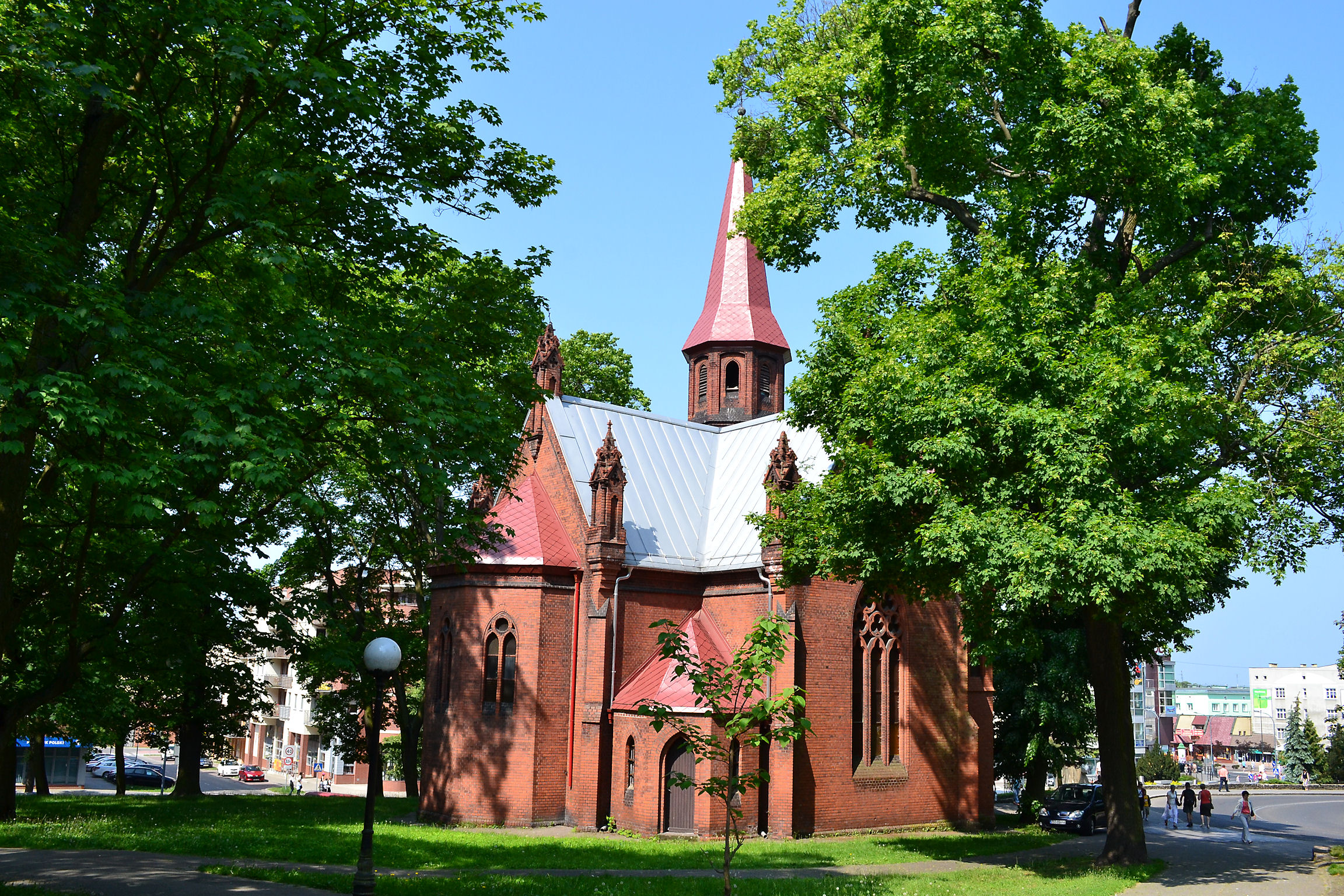 Cerkiew Świętych Apostołów Piotra i Pawła w Stargardzie Szczecińskim